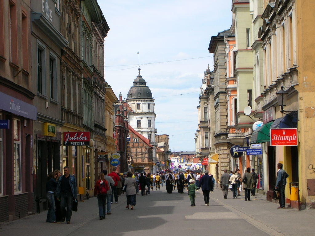 Deptak - ul.Królowej Jadwigi.